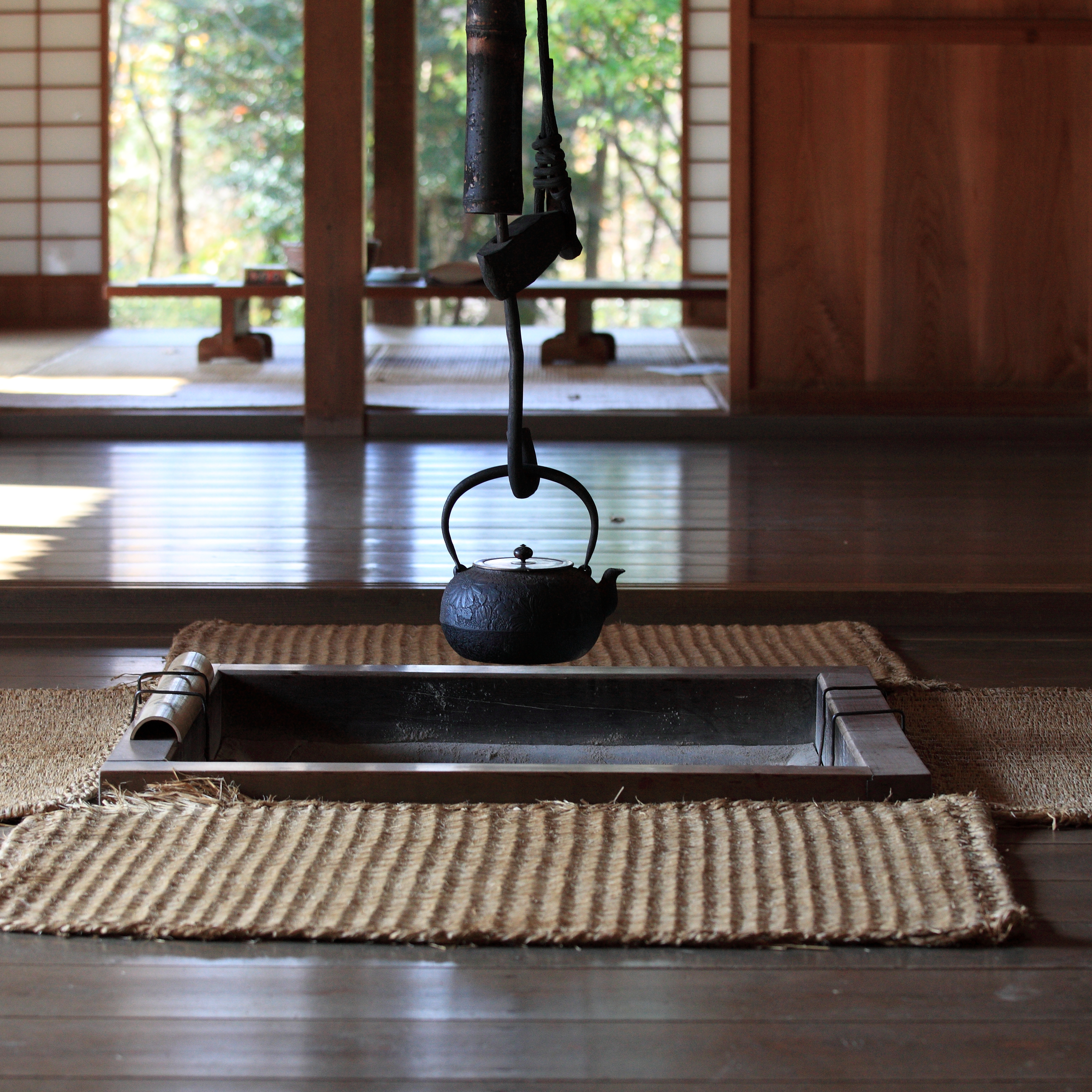 Boso-no-Mura Museum, Inba-gun(county) Chiba-ken(Prefecture), Japan %u5343%u8449%u770C%u5370%u65DB%u90E1(%u3061%u3070%u3051%u3093 %u3044%u3093%u3070%u3050%u3093) %u623F%u7DCF%u306E%u3080%u3089(%u307C%u3046%u305D%u3046%u306E%u3080%u3089)